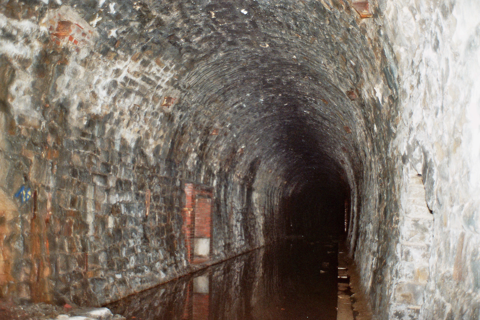 Das Innere der ehemaligen U-Verlagerung „Kauz“ in der Oströhre des Scheetunnels an der Bahnstrecke Wuppertal-Wichlinghausen–Hattingen; Bereich wahrscheinlich in der Nähe des Nordportals (Stadtgebiet Sprockhövel)